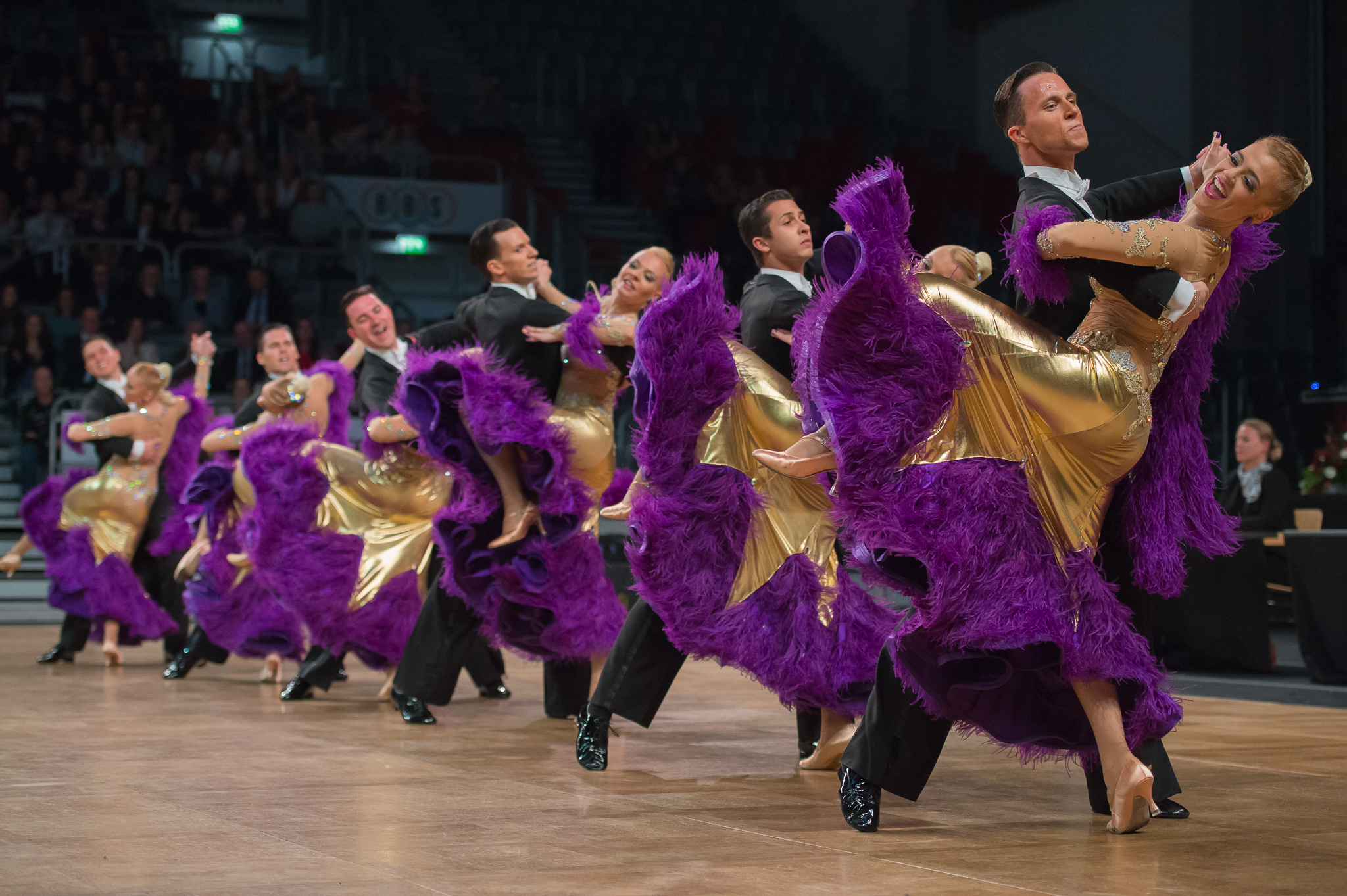 1. TC Ludwigsburg,Brose Arena Bamberg,Deutsche Meisterschaften der Formationen Standard & Latein 2016,Kontraste,Standard,Tanzsport